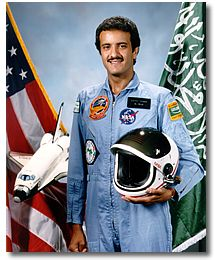 سلطان الامير